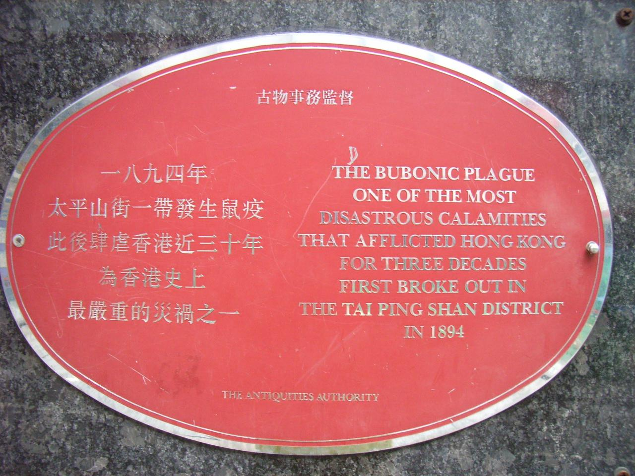 香港上環普仁坊卜公花園Sheung Wan, Hong Kong